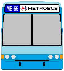 Frontal Metrobus